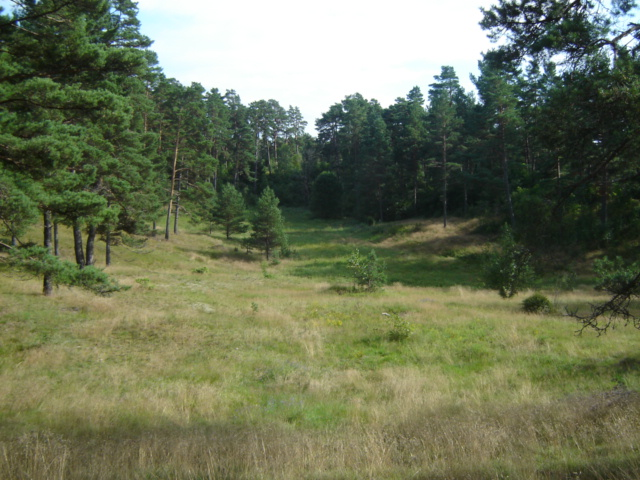 Vaade Kärla Lihulinna õuele